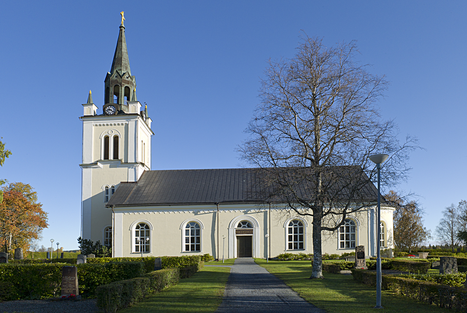 Ås kyrka i Jämtland